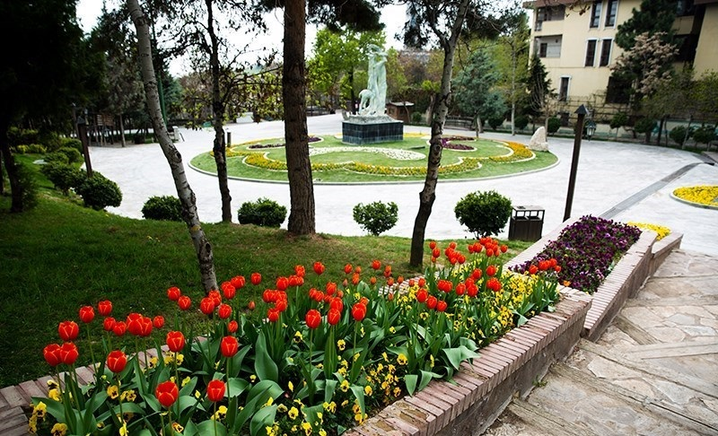 روز طبیعت در تهران